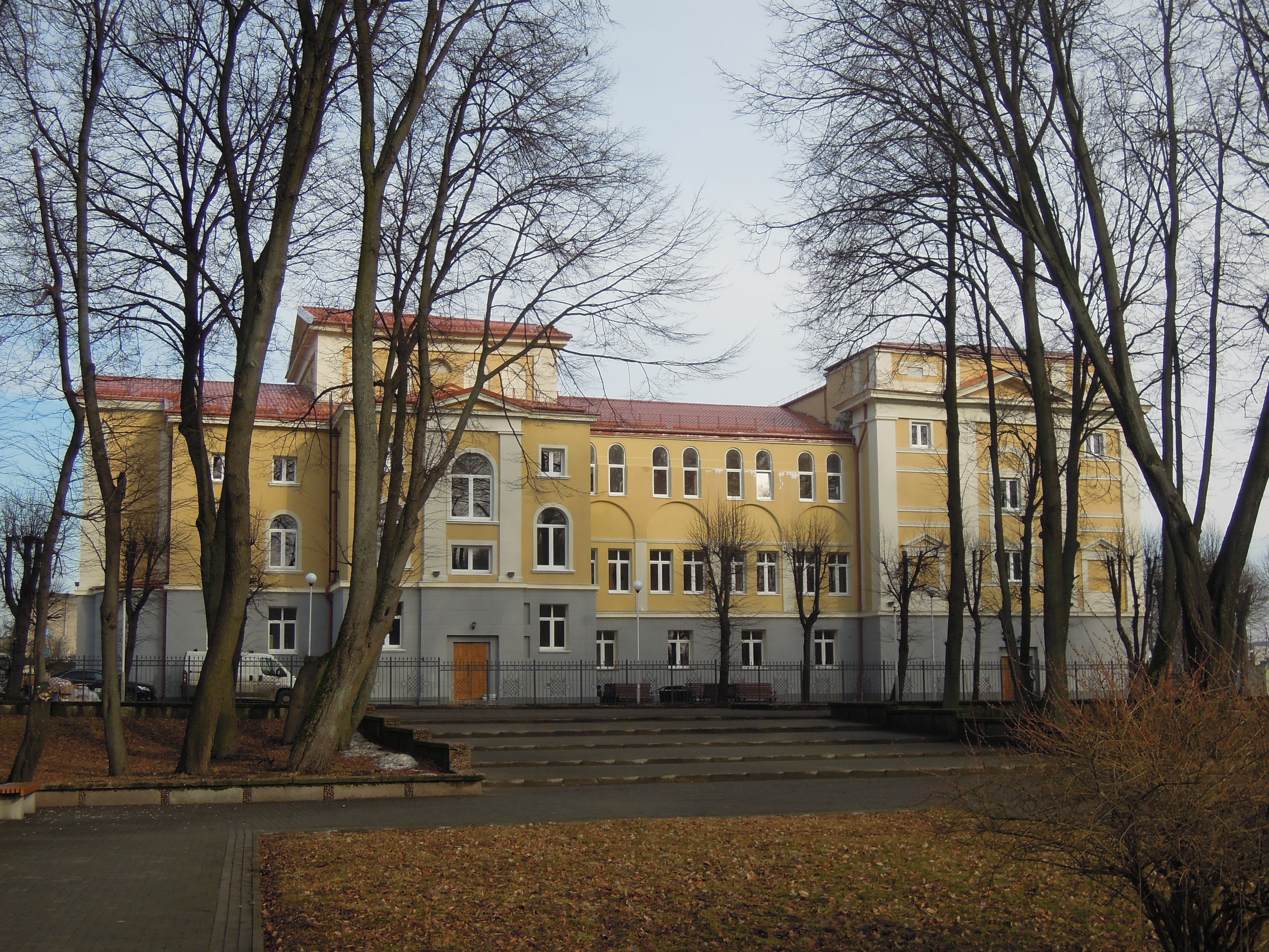 Тильзит-театр, Советск, Калининградская область